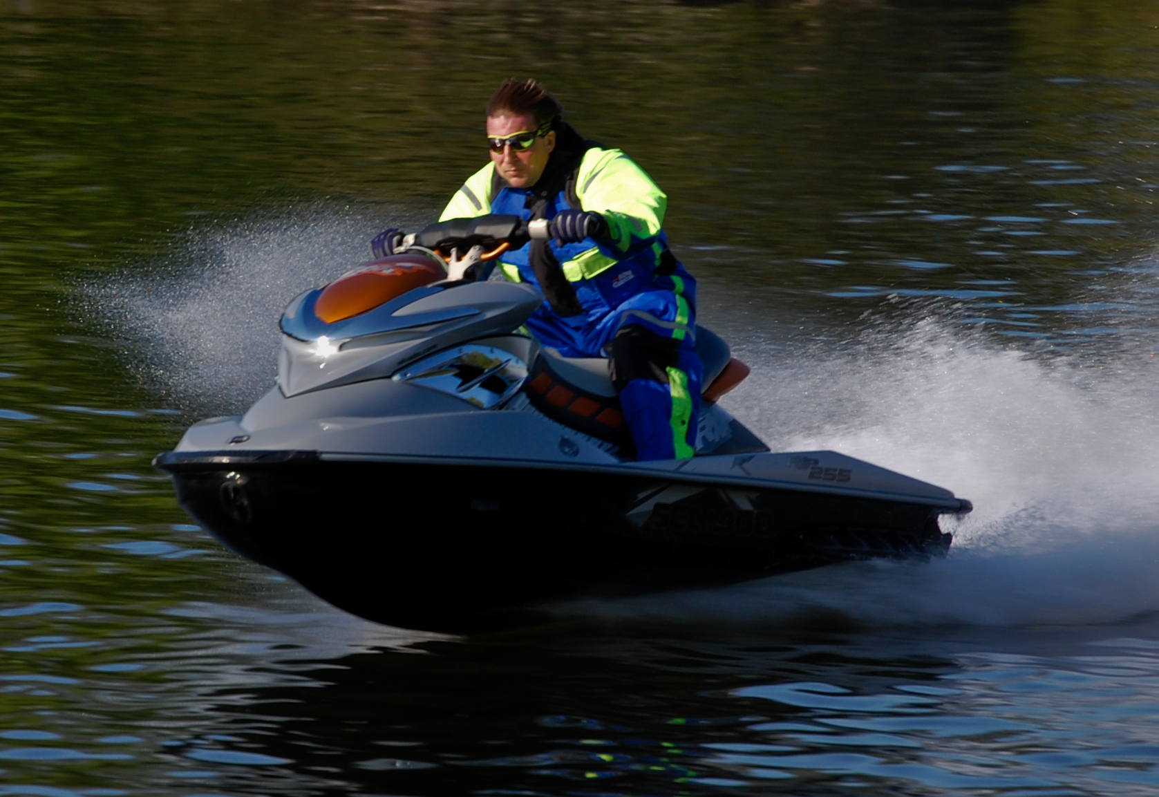 Vattenskoter i Stockholms skärgård.